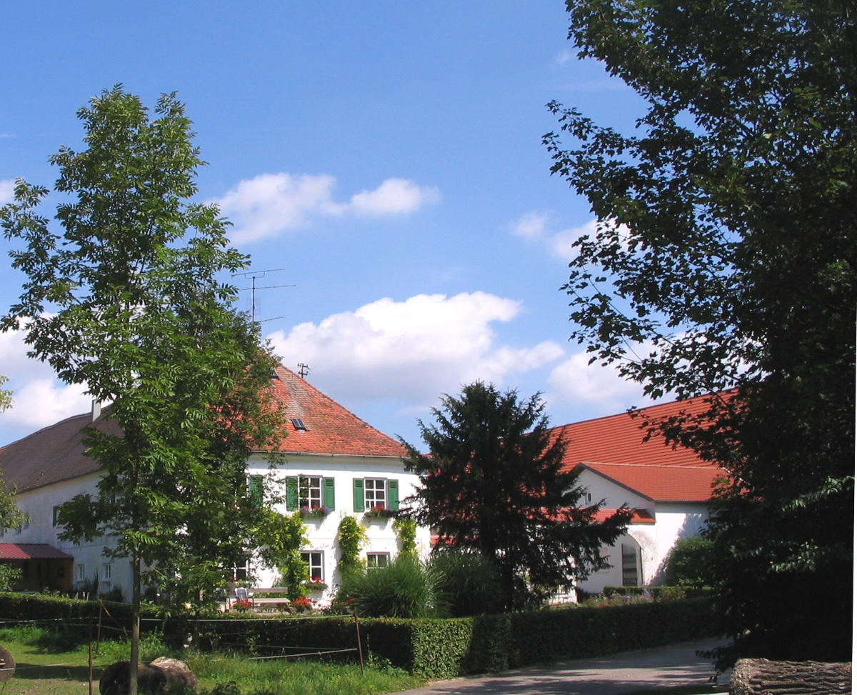 Neustadt an der Donau, Ortsteil Deisenhofen: Gutshof